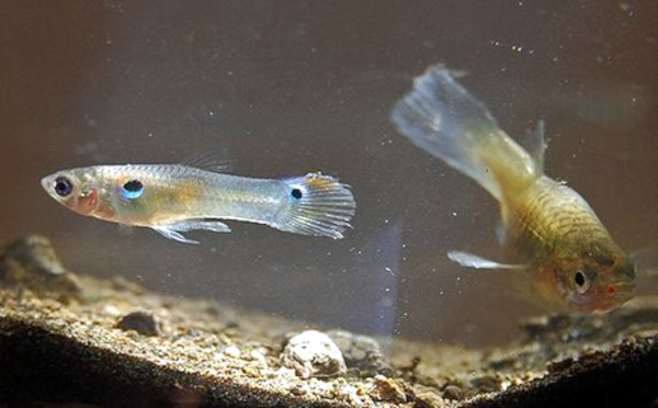 Poecilia reticulata